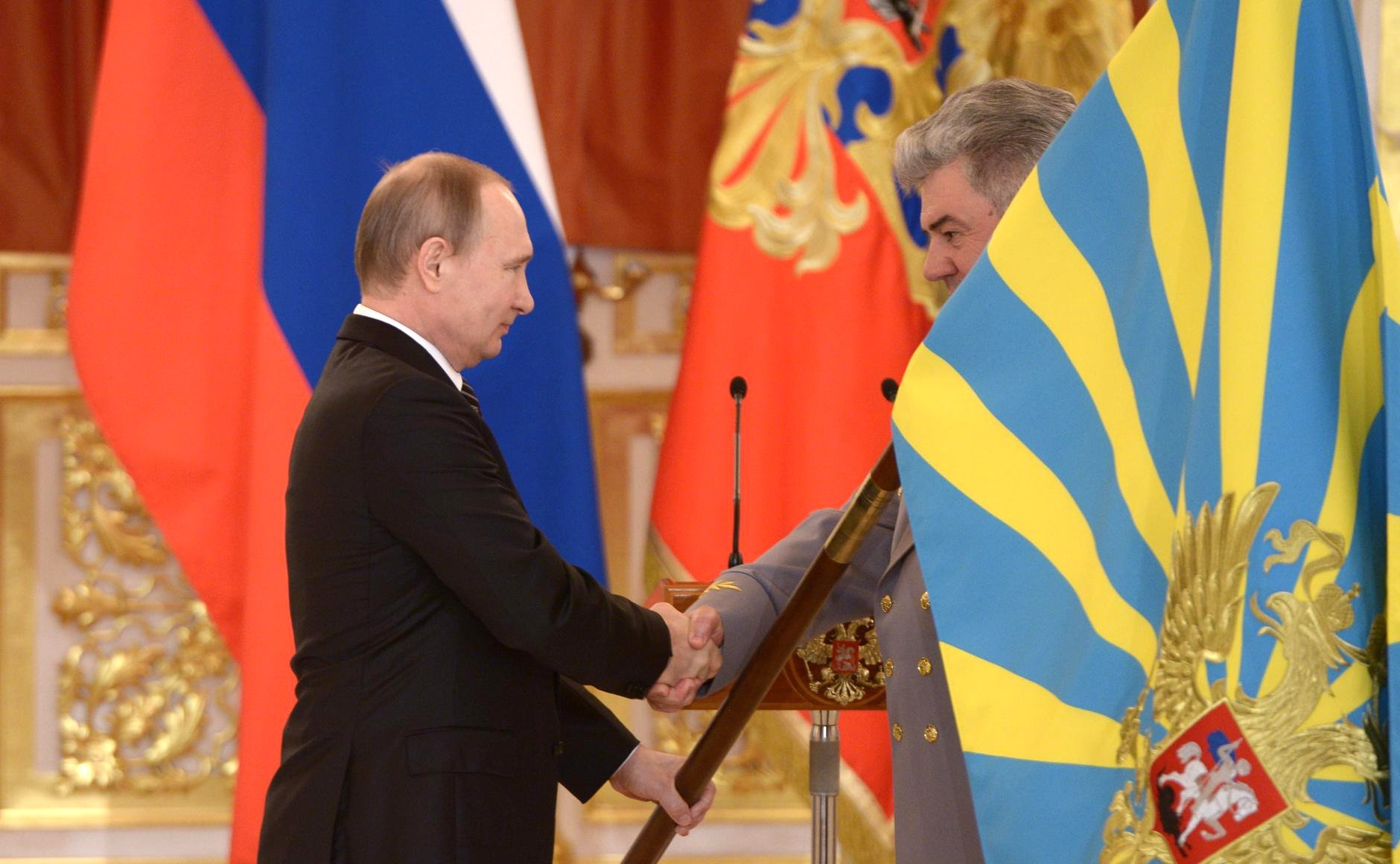 Церемония вручения Главнокомандующим ВС РФ Владимиром Путиным Боевого знамени Воздушно-космических сил главнокомандующему ВКС генерал-полковнику Виктору Бондареву